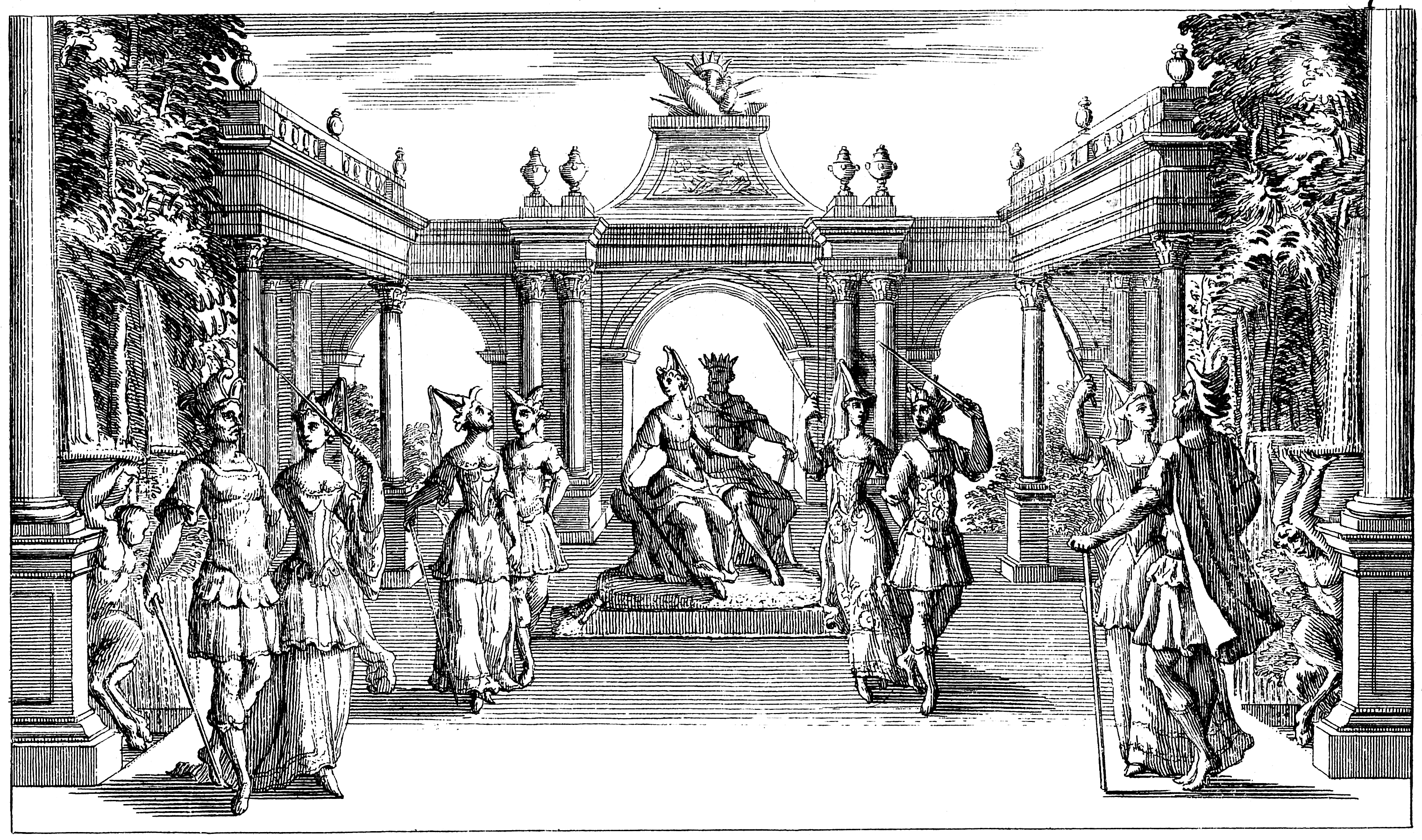 Jean-Baptiste Lully - Roland - Prologue - Paris 1685